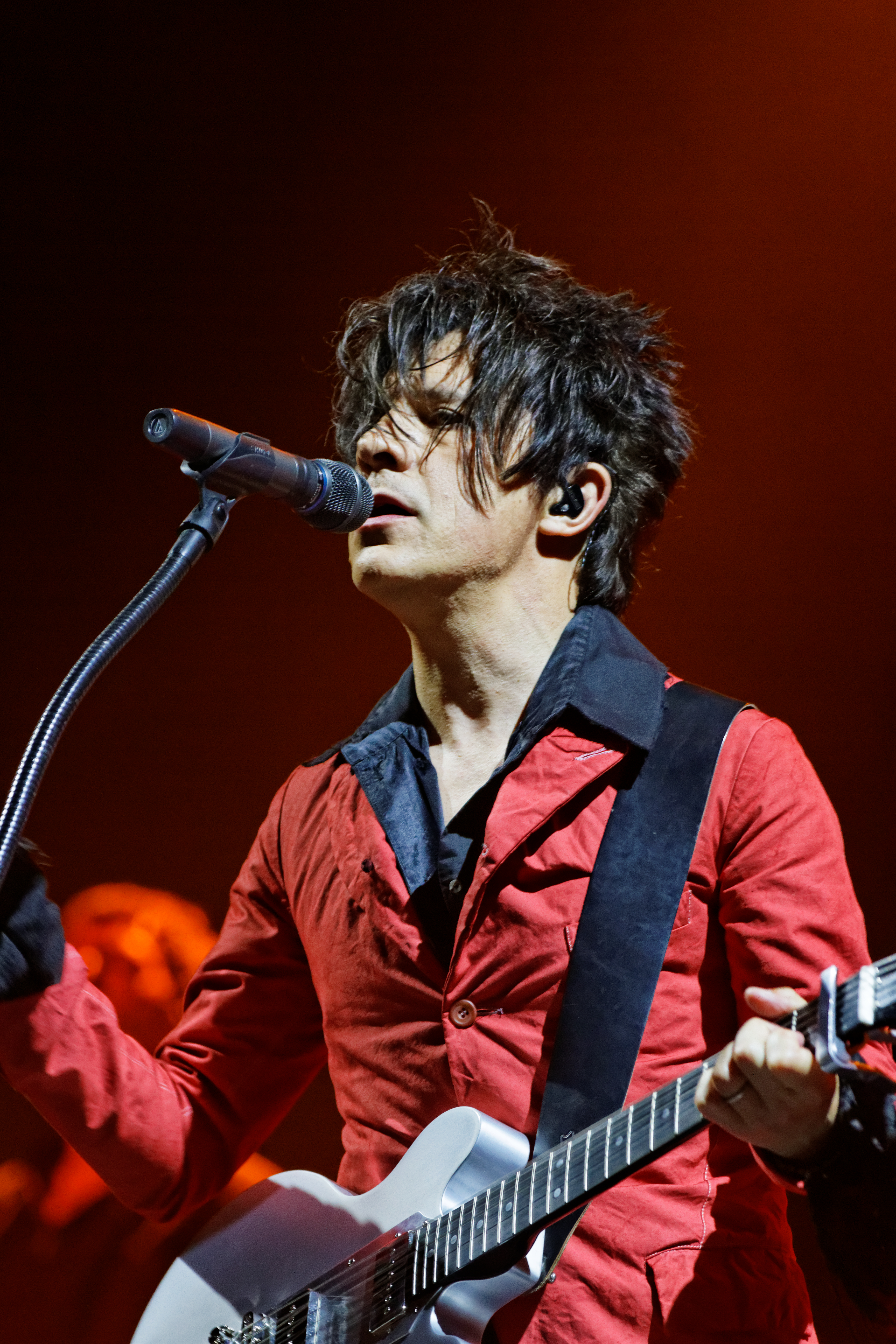 Indochine en concert sur la scène Glenmor lors du festival des Vieilles Charrues 2014.